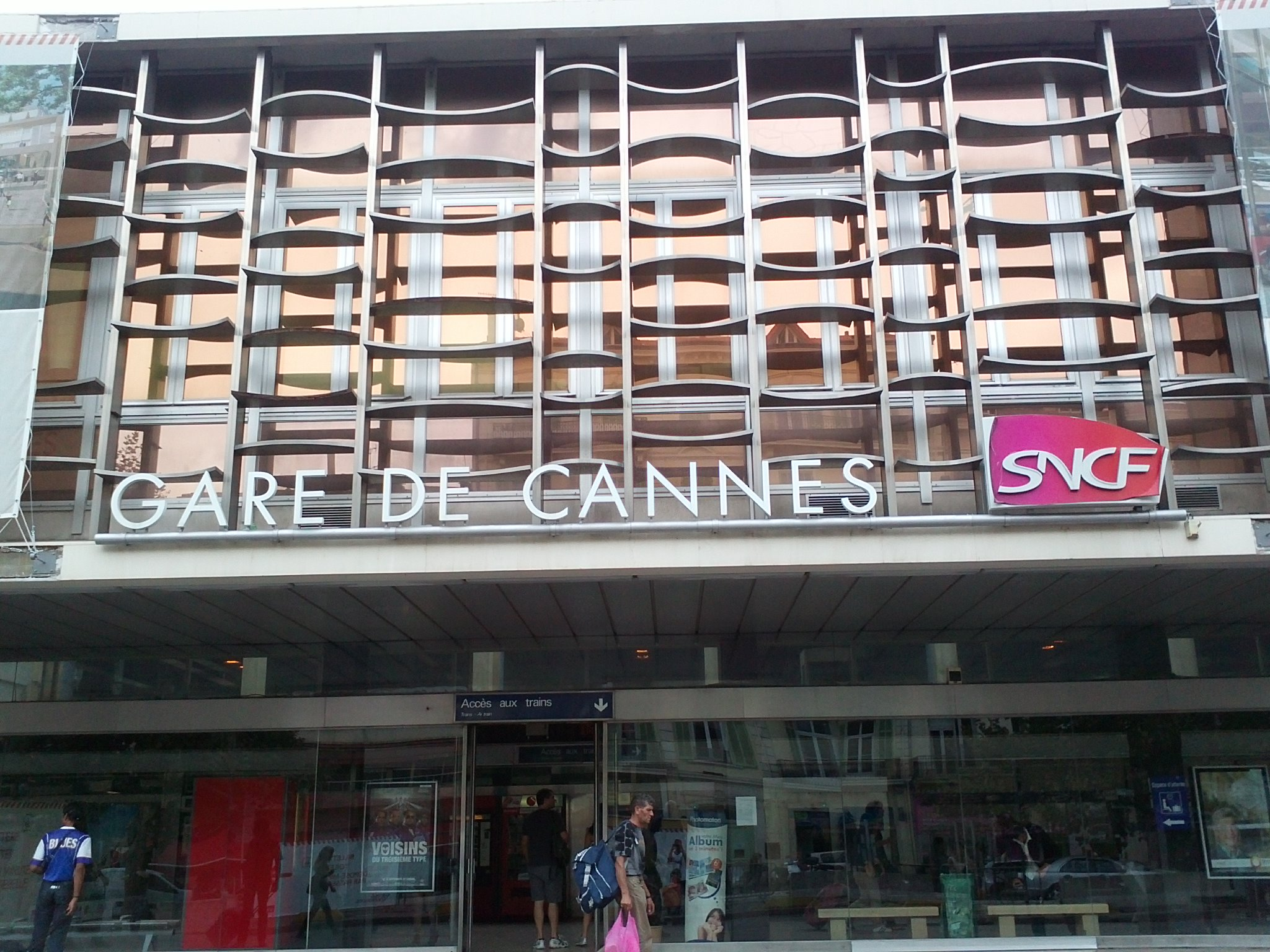 戛纳站(Cannes)